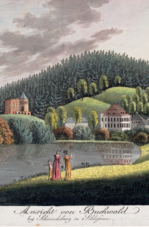 Buchwald bei Schmiedeberg Schlesien Graphiksammlung Haselbach)